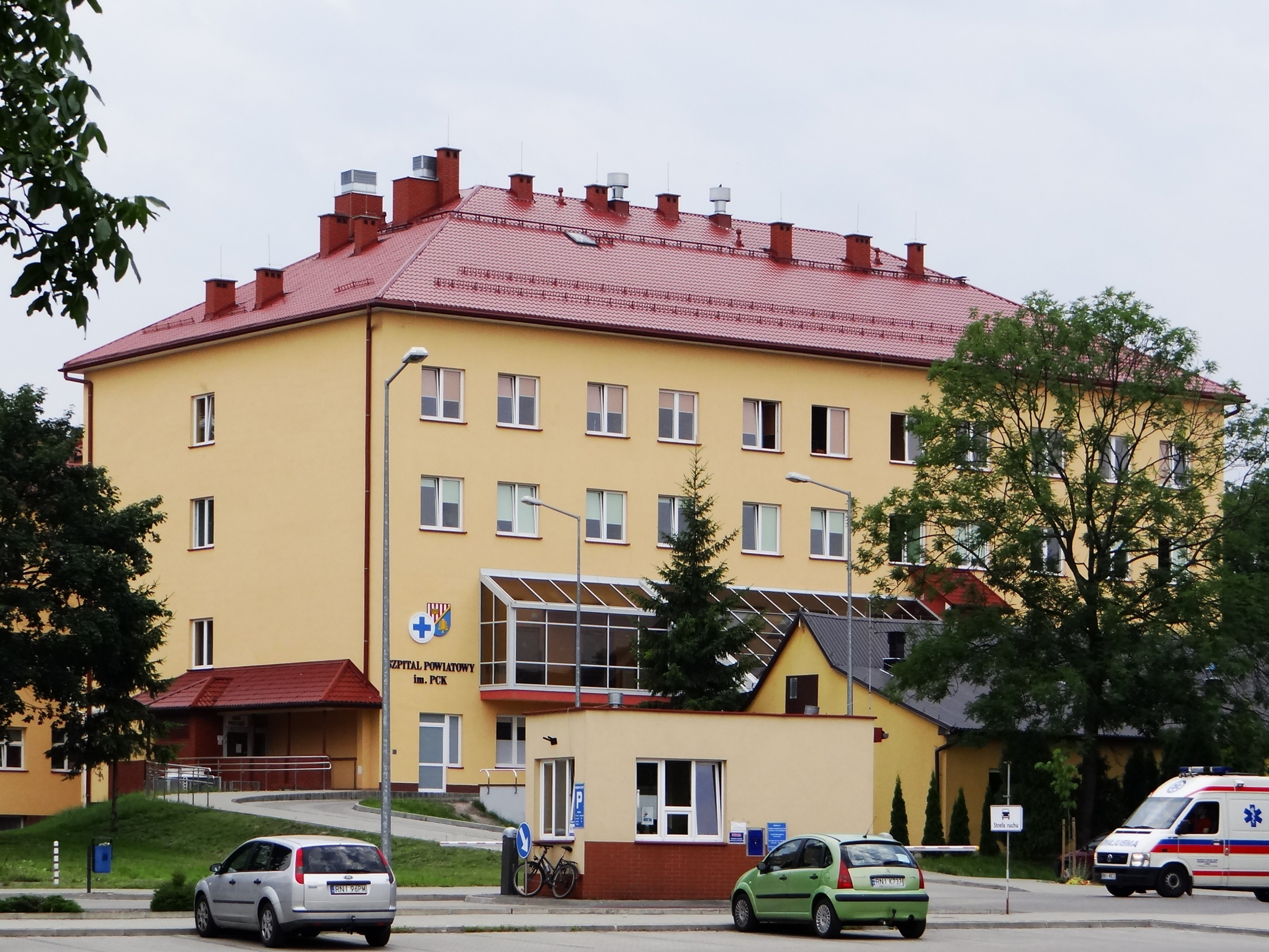 Zdjęcie wykonane w miejscowości Nisko.